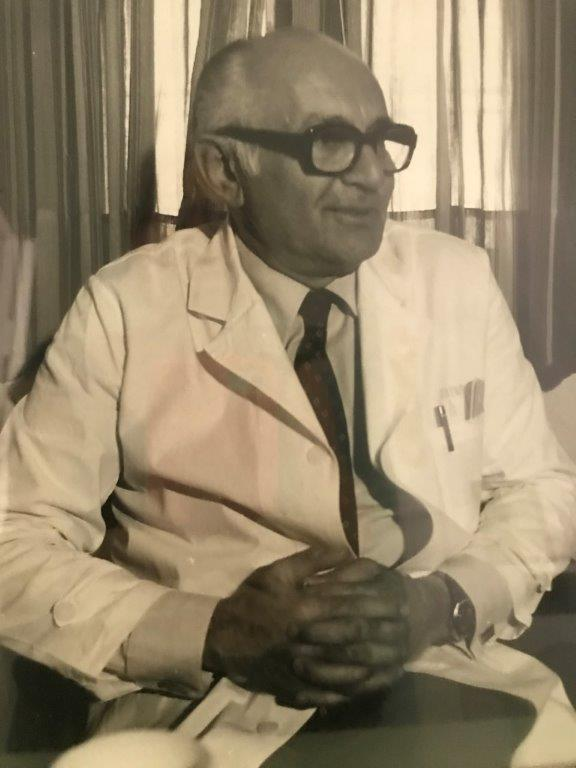 מיסד המחלקה לטיפול נמרץ ילודים פרופ' מתתיהו (מתי ) זלצר